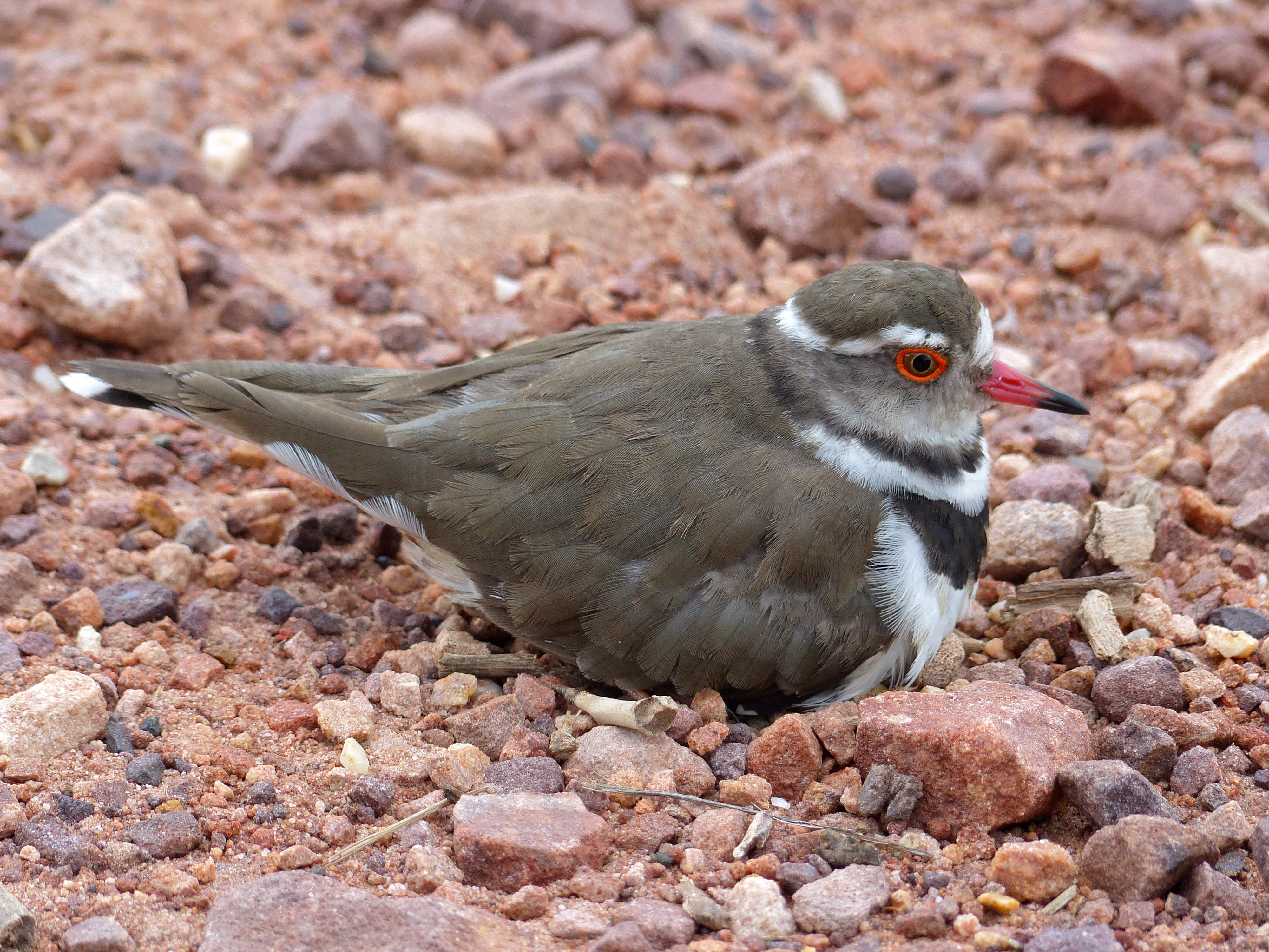 Mahonie Loop near Punda Maria, Kruger NP, SOUTH AFRICA